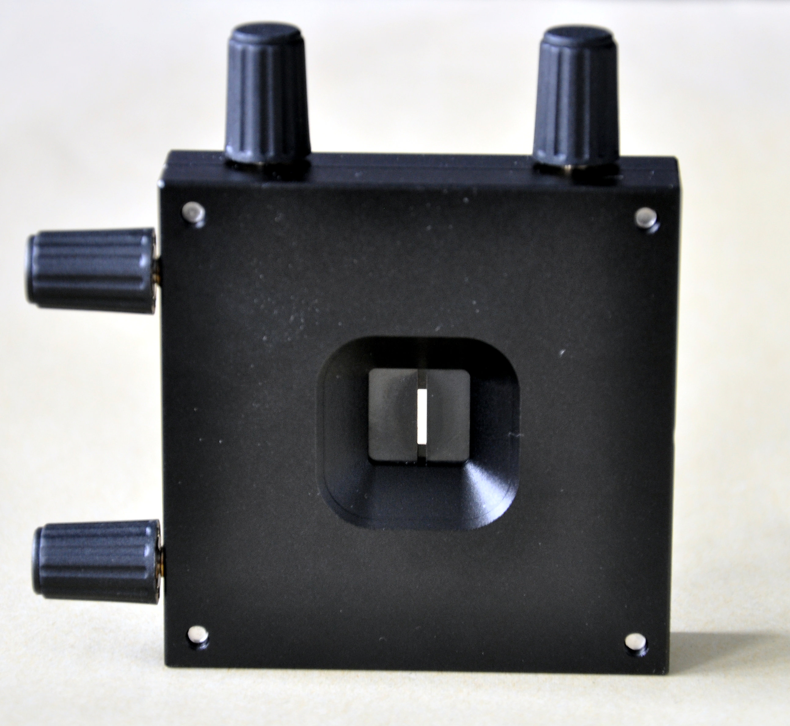 Rechteckiger optischer Spalt (der Fa. Owis), bei dem alle vier Kanten einzeln justierbar sind